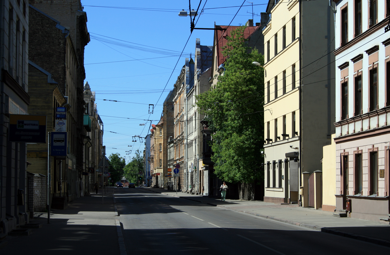 Tallinas iela robežā starp Rīgas centru un Grīziņkalnu